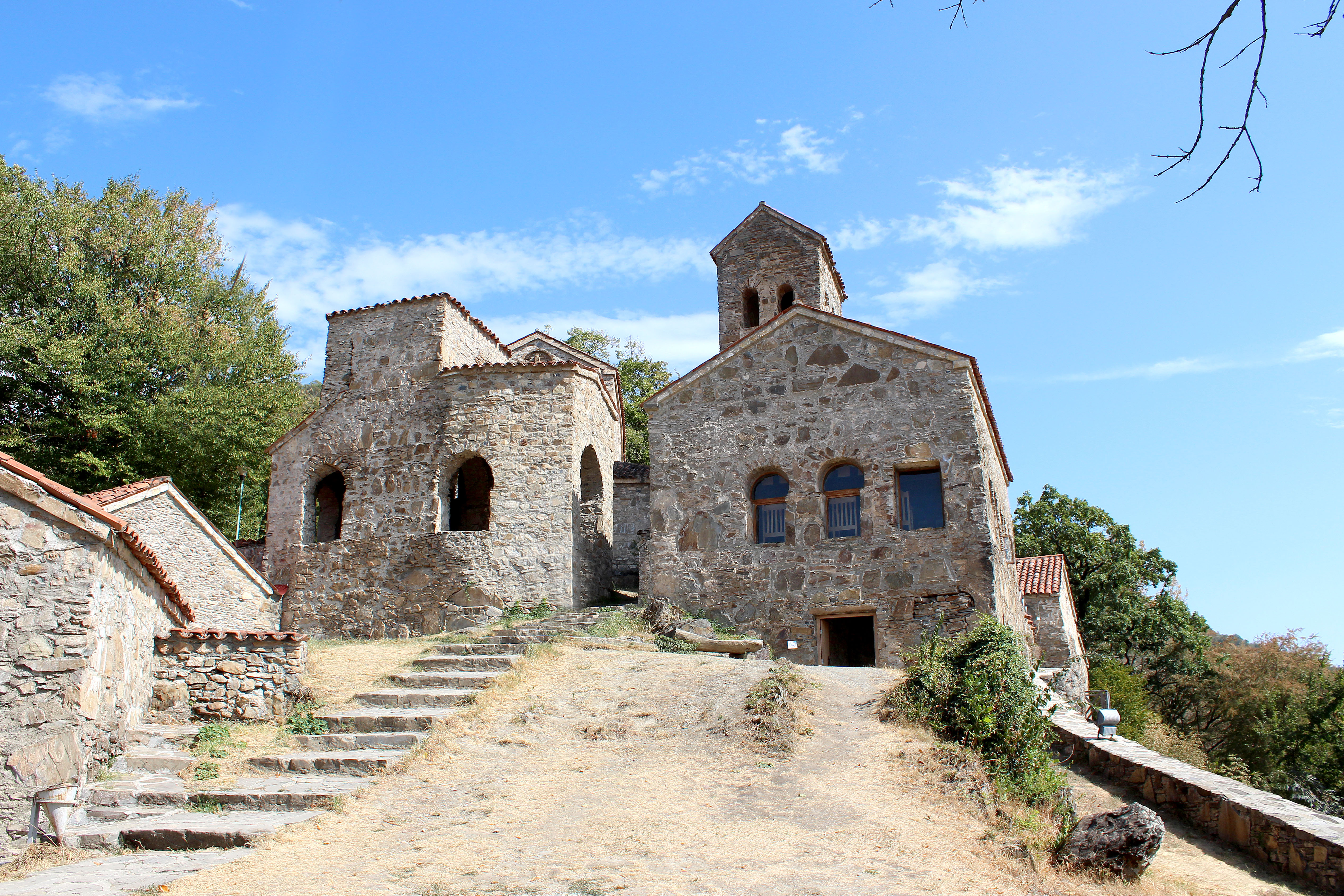 ღვთისმშობლის მიძინების სამეკლესიანი ბაზილიკა